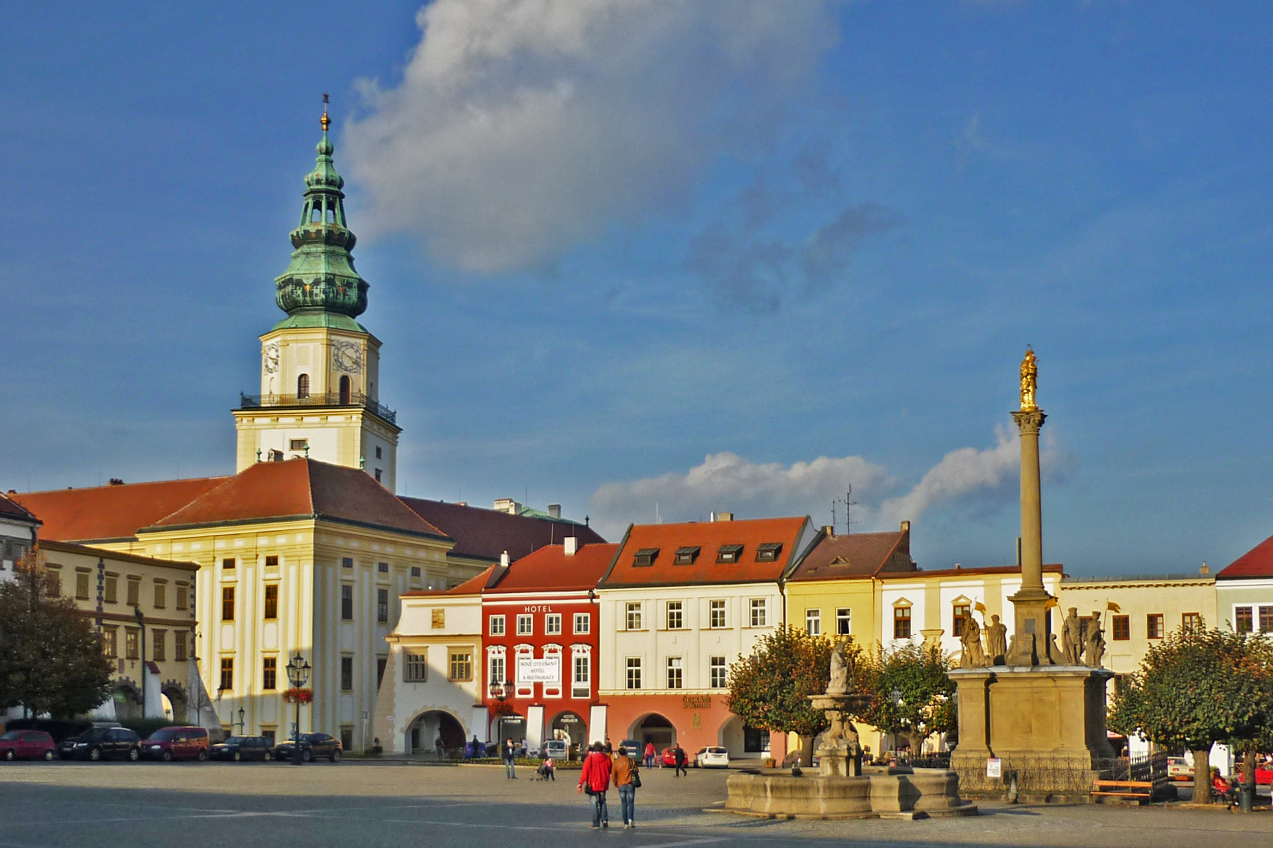 Ringplatz (Velké náměstí) in Kremsier (Kroměříž) in Mähren, Blick zum Schloss